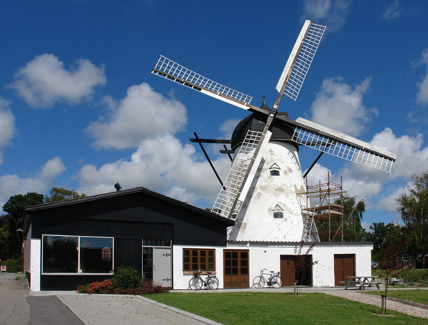 Sindal Mühle. Die Kappenwindmühle aus Ziegelstein mit zwei Mahlgängen und einem Walzwerk wurde 1872 von Fjeldsted nach Sindal verlegt.